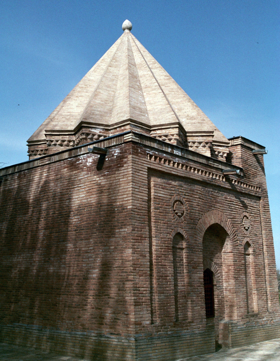 Кумбез Бабаджи хатун